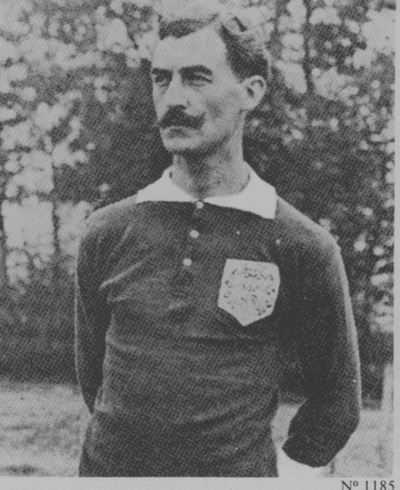 Portrait de Robert Diochon